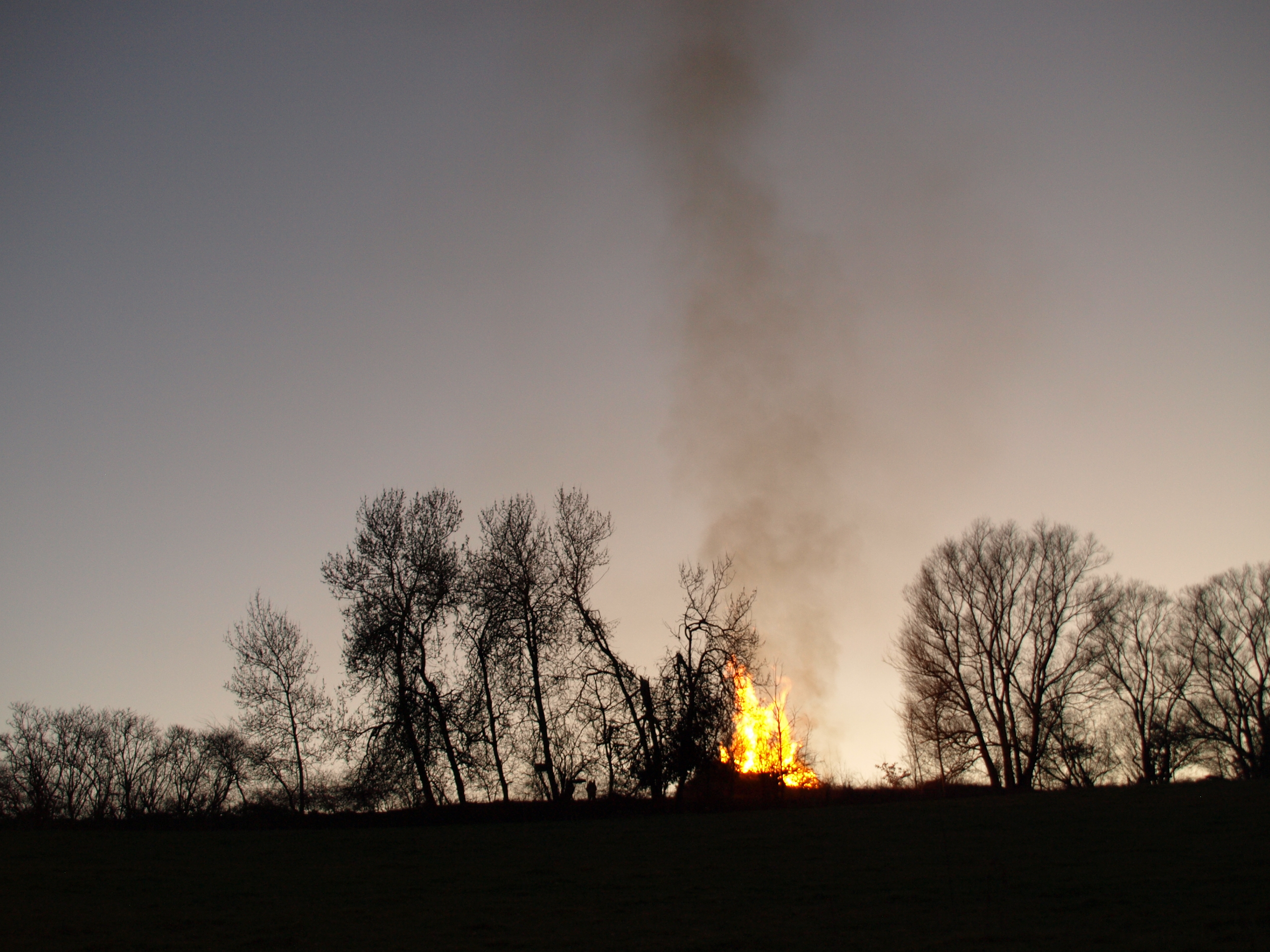 Hutzelfeuer in Burghaun im Jahr 2014